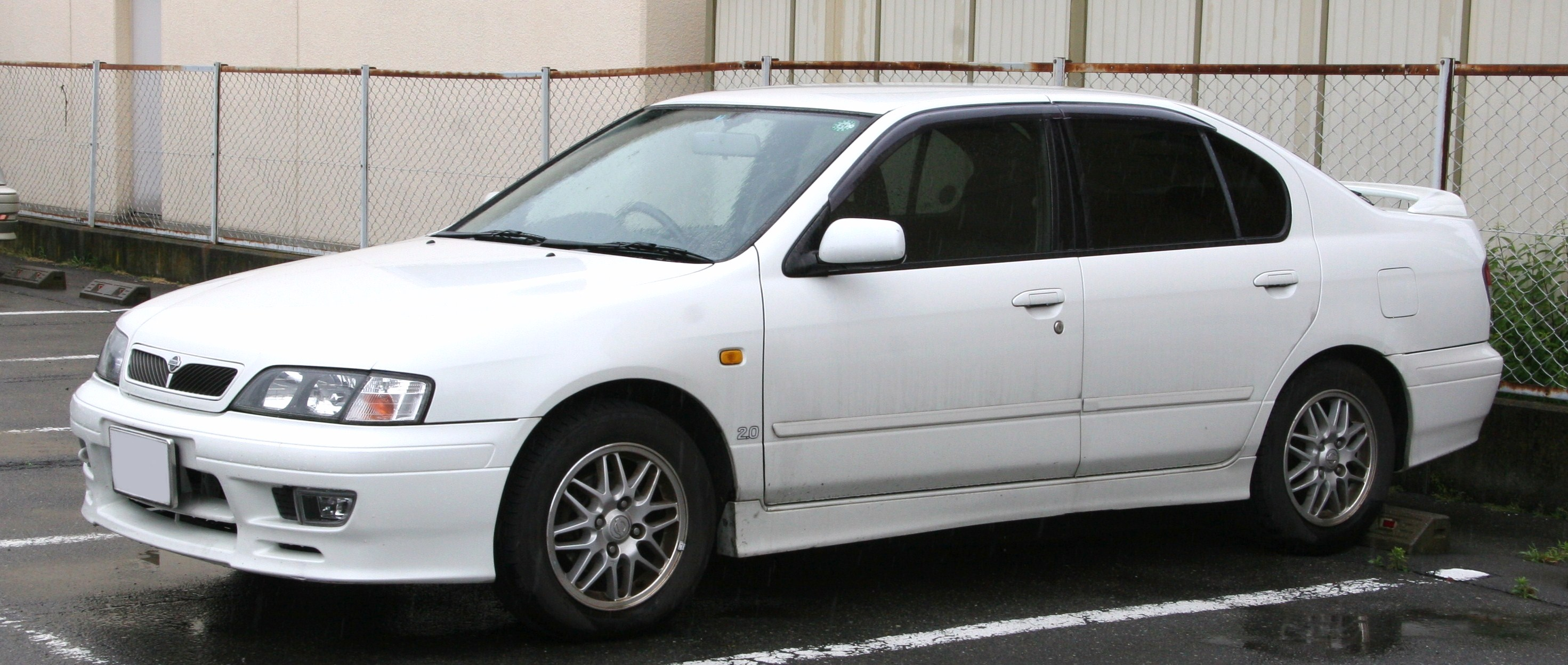 NISSAN Primera